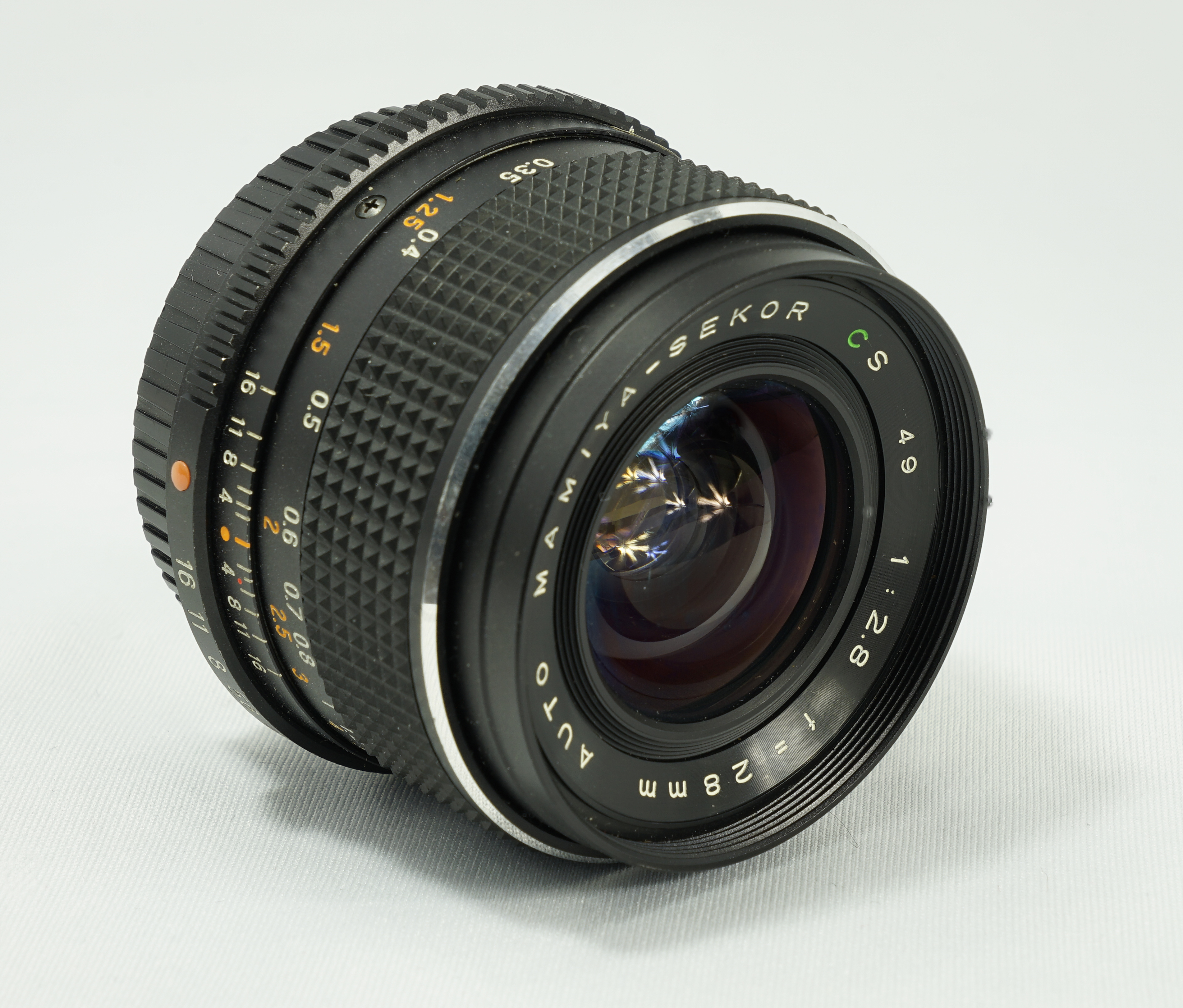 Auto Mamiya-Sekor CS f2.8 28 mm